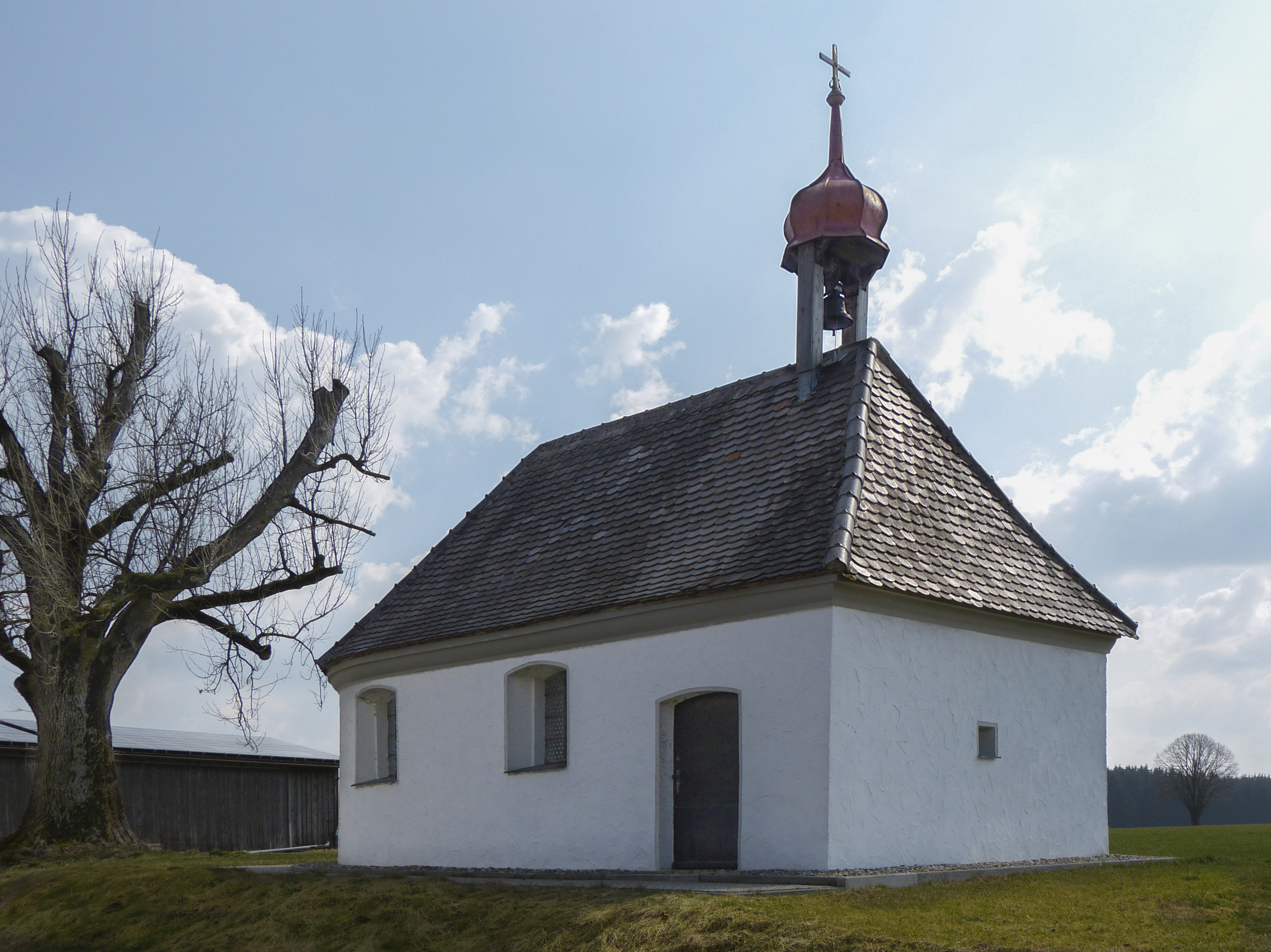 St. Maria, Dilpersried, Gemeinde Lautrach, Landkreis Unterallgäu, Bayern